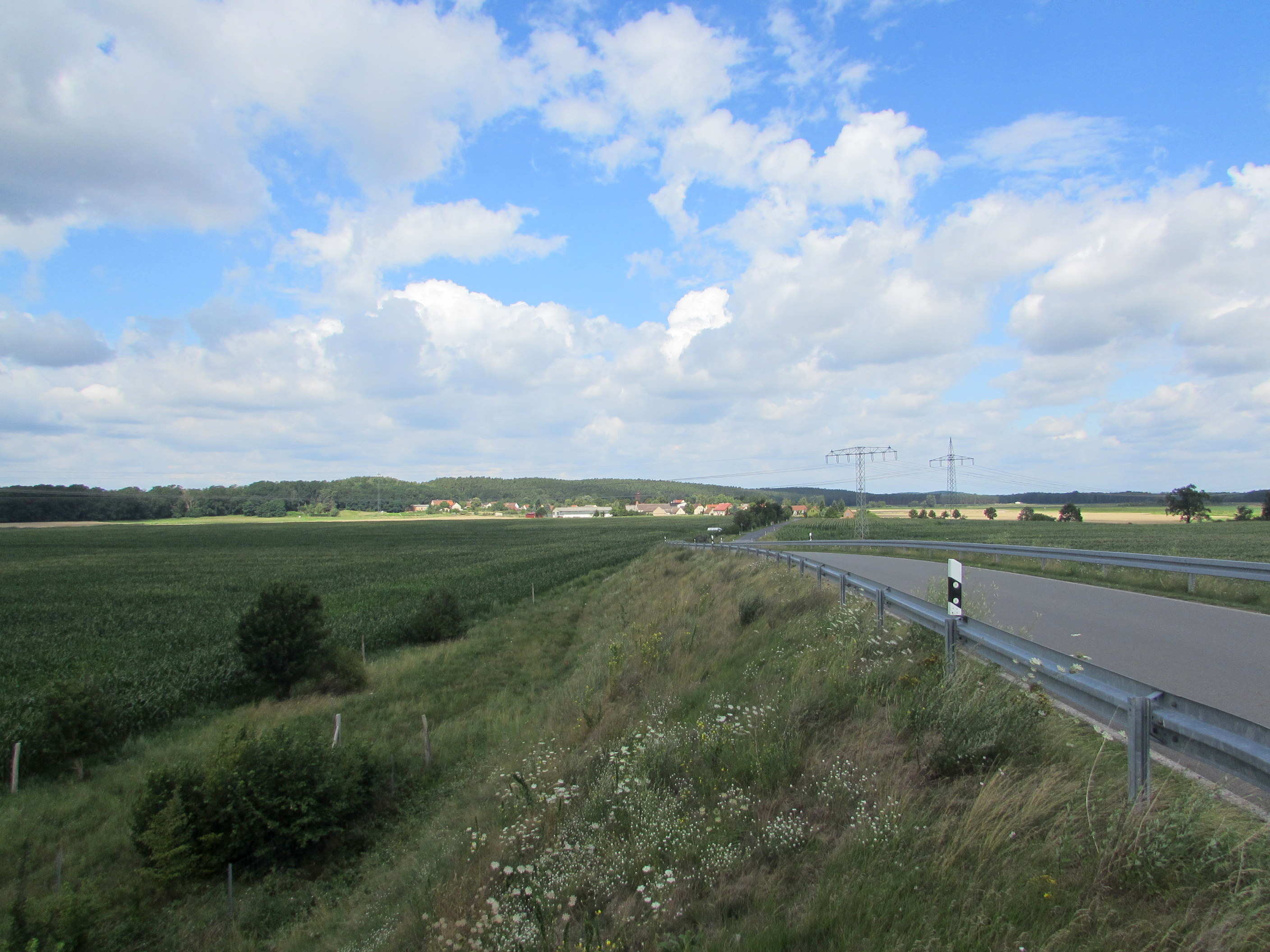 blick auf vehlen, hintergrund vehlenscche berge